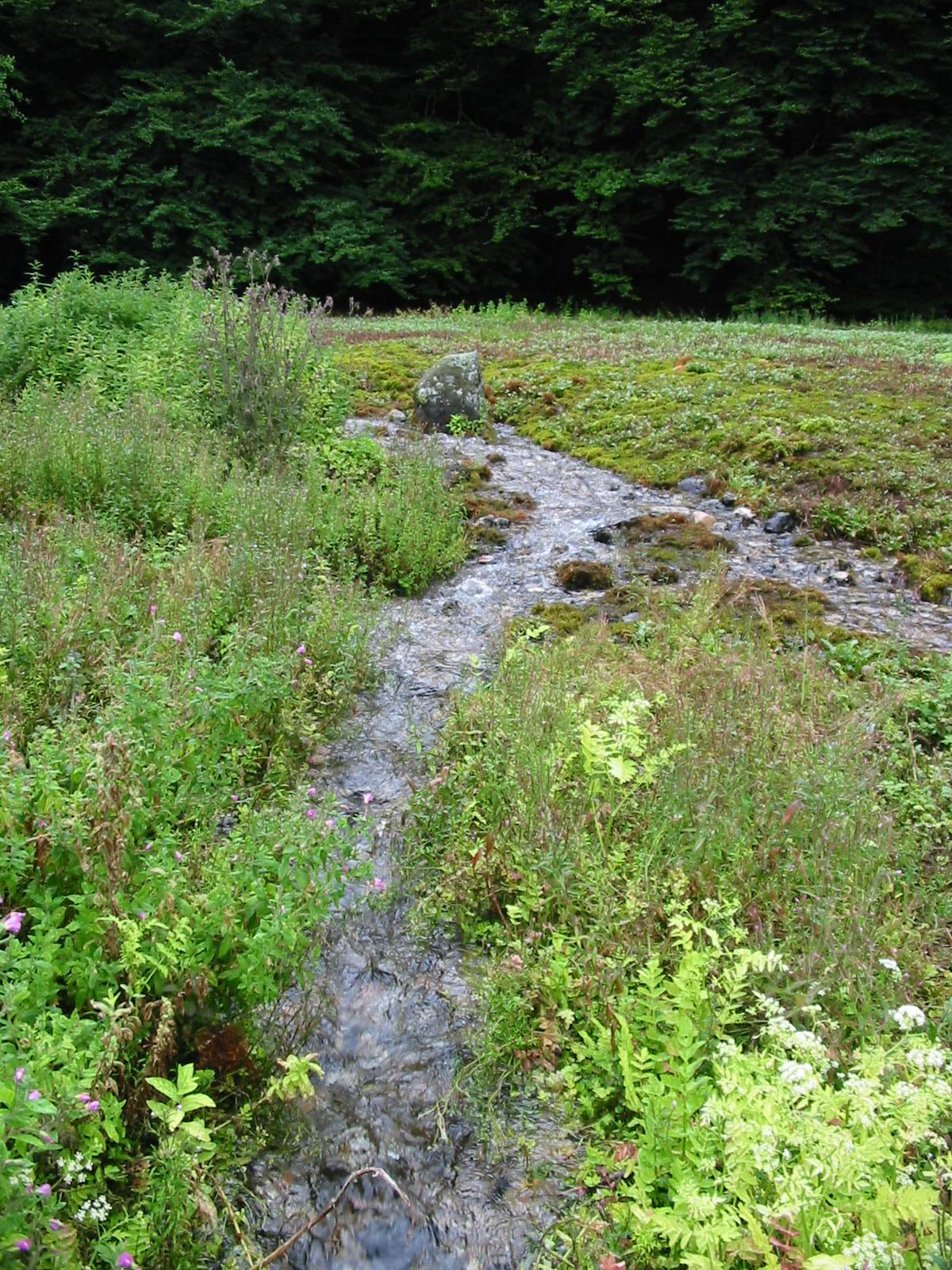 Ravnkilde, en sumpkilde i Rebild Bakker